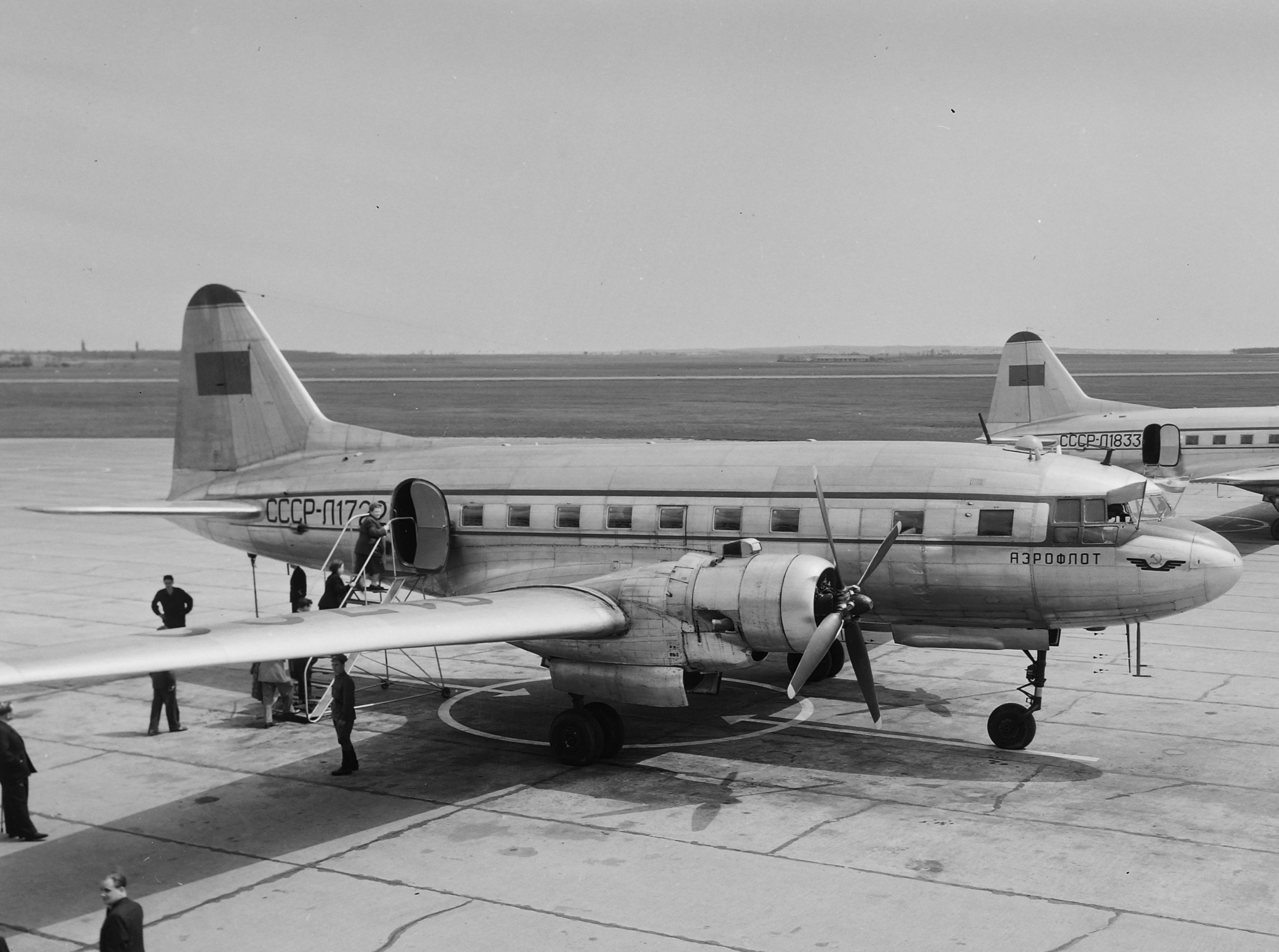 IL-12-es repülőgépek. Location: Hungary, Budapest XVIII. Tags: transport, airplane, Soviet brand, Budapest Title: IL-12-es repülőgépek.